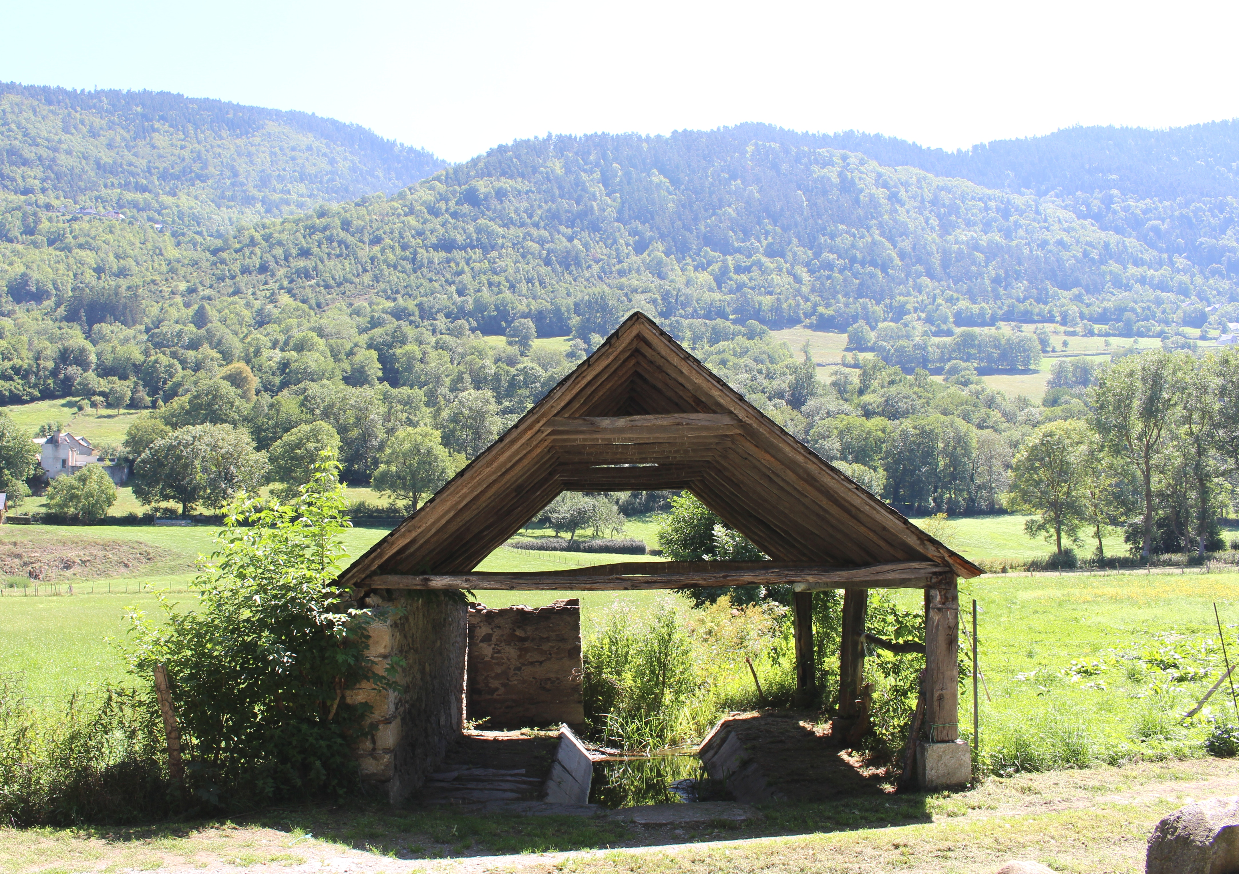 Lavoir de Guchan (Hautes-Pyrénées)